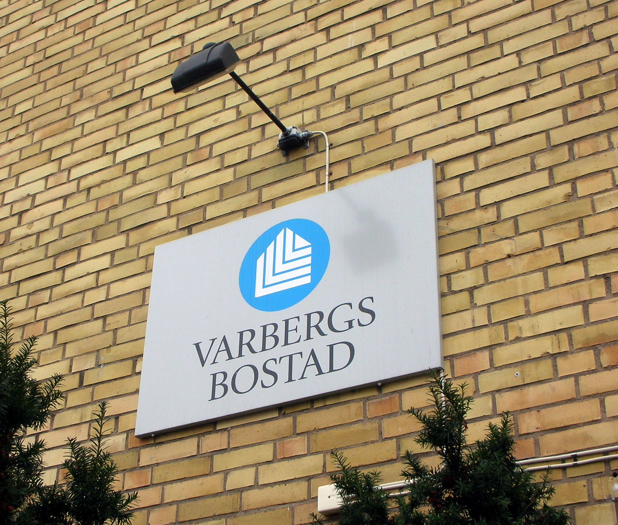 Skylt med Varbergs Bostads logotyp på en husfasad i Varberg.